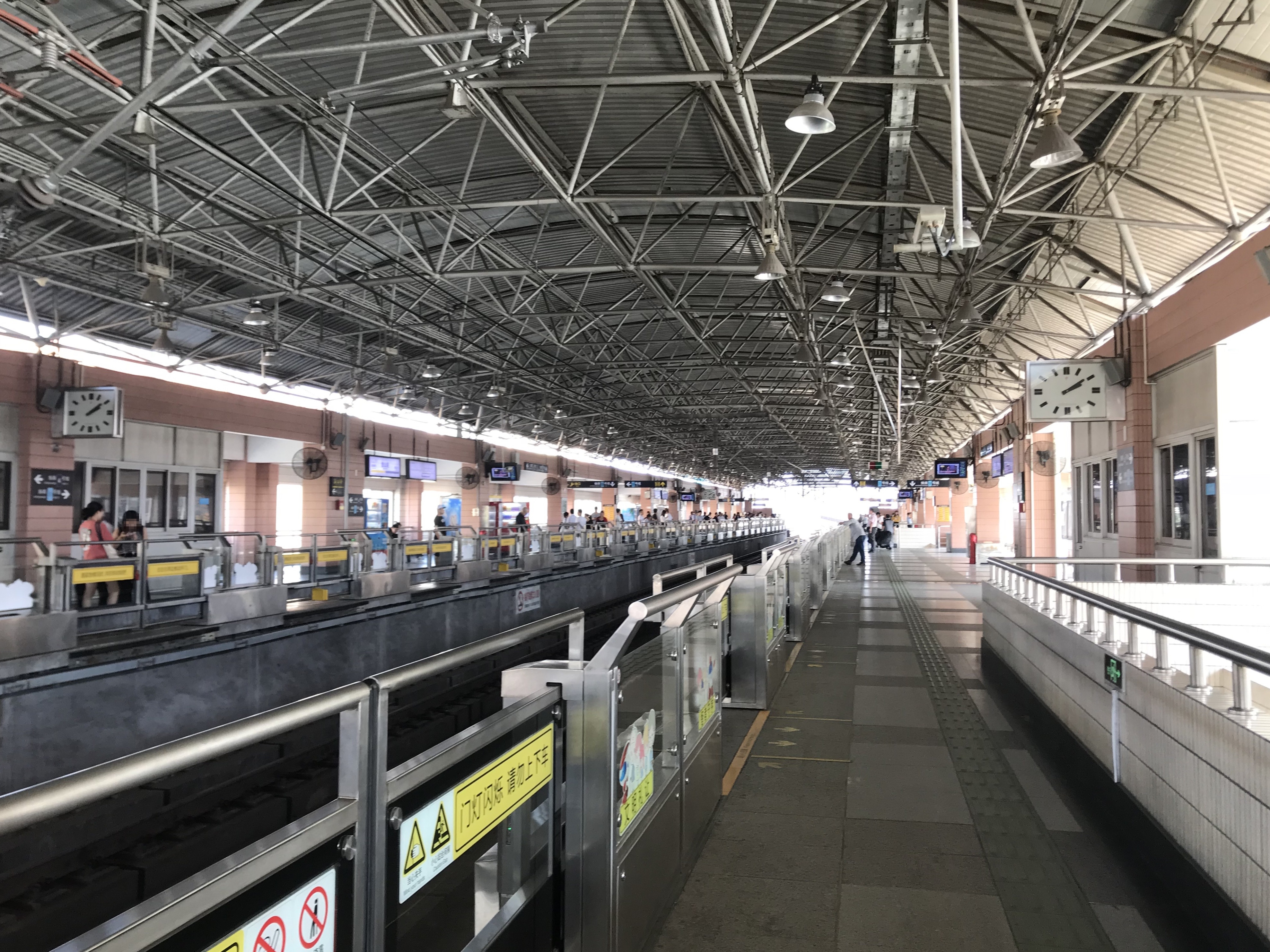 宜山路駅(上海地下鉄3号線)のホーム